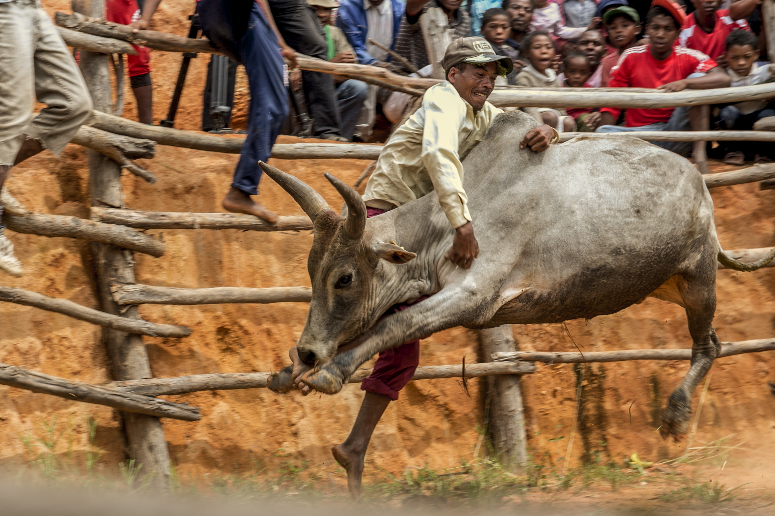 Savika est un sport proche du rodéo ou de la corrida, pratiqué par les hommes du groupe ethnique betsileo, à Madagascar. Il est considéré comme un rite de passage et quiconque osera danser avec un zébu sera considéré comme un héros par la communauté. This is an image with the theme "Play" from: Madagascar